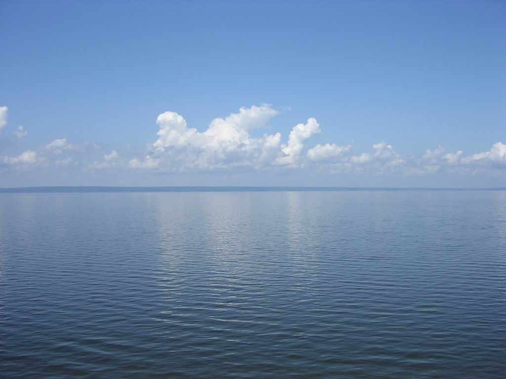 Volga near Ulyanovsk